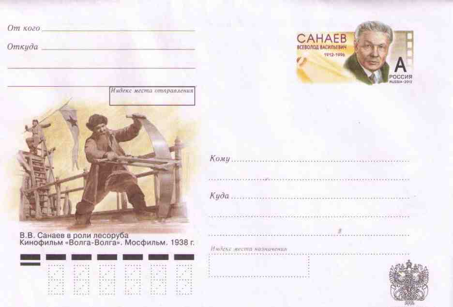 Санаев Всеволод Васильевич, почтовый конверт